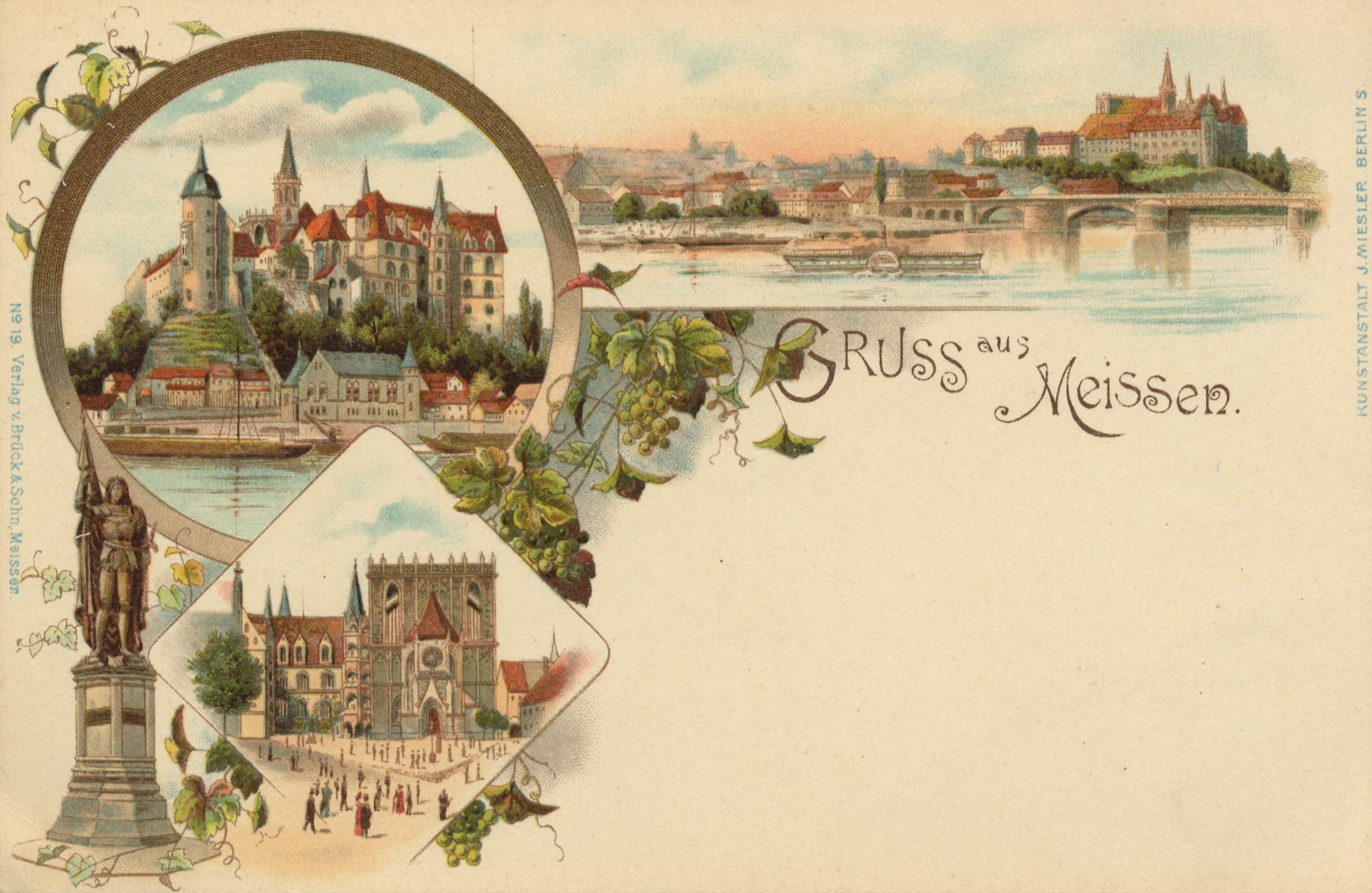 Stadtansichten und Gebäudeansichten